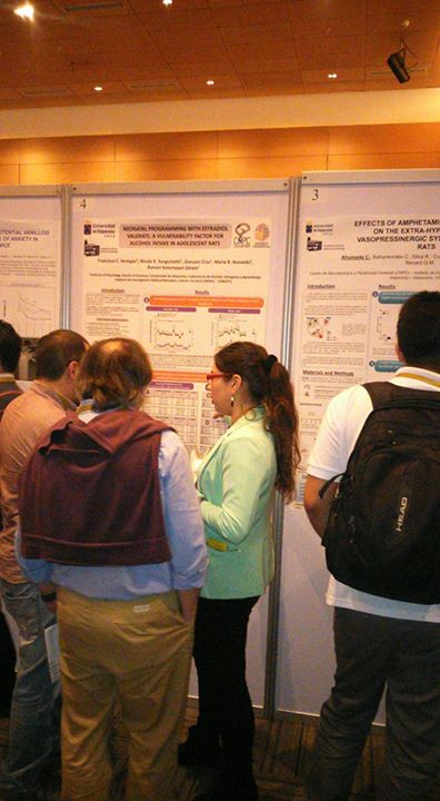 Enseñansa de la neuroquimica en el Laboratorio de Neuroquímica y Neurofarmacología de Copiapo Chile